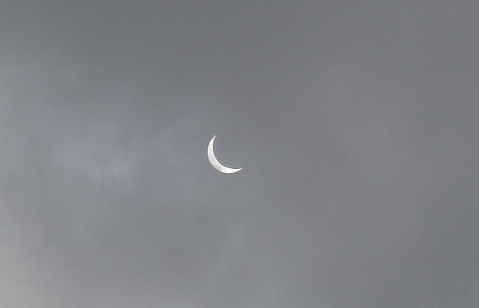 ליקוי חמה, 29.3.06, שעה 12:57 בצהריים, צפון רמת הגולן. צילם דוד שי, במצלמה צבעונית.